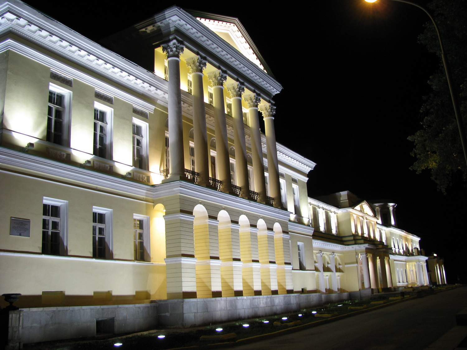 Усадьба Расторгуевых